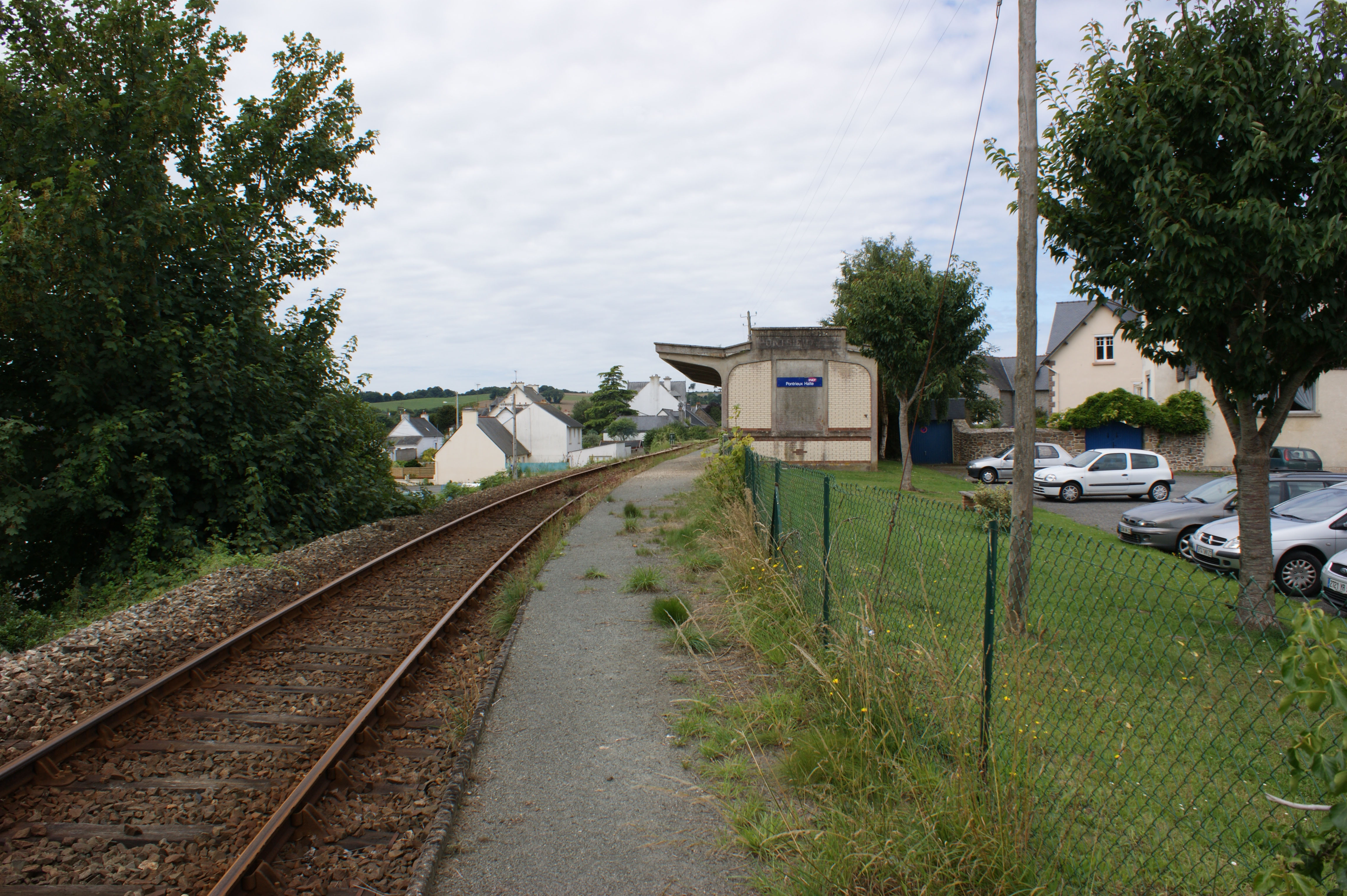 Le quai, la voie et l'ancien bâtiment servant d'abri de quai.